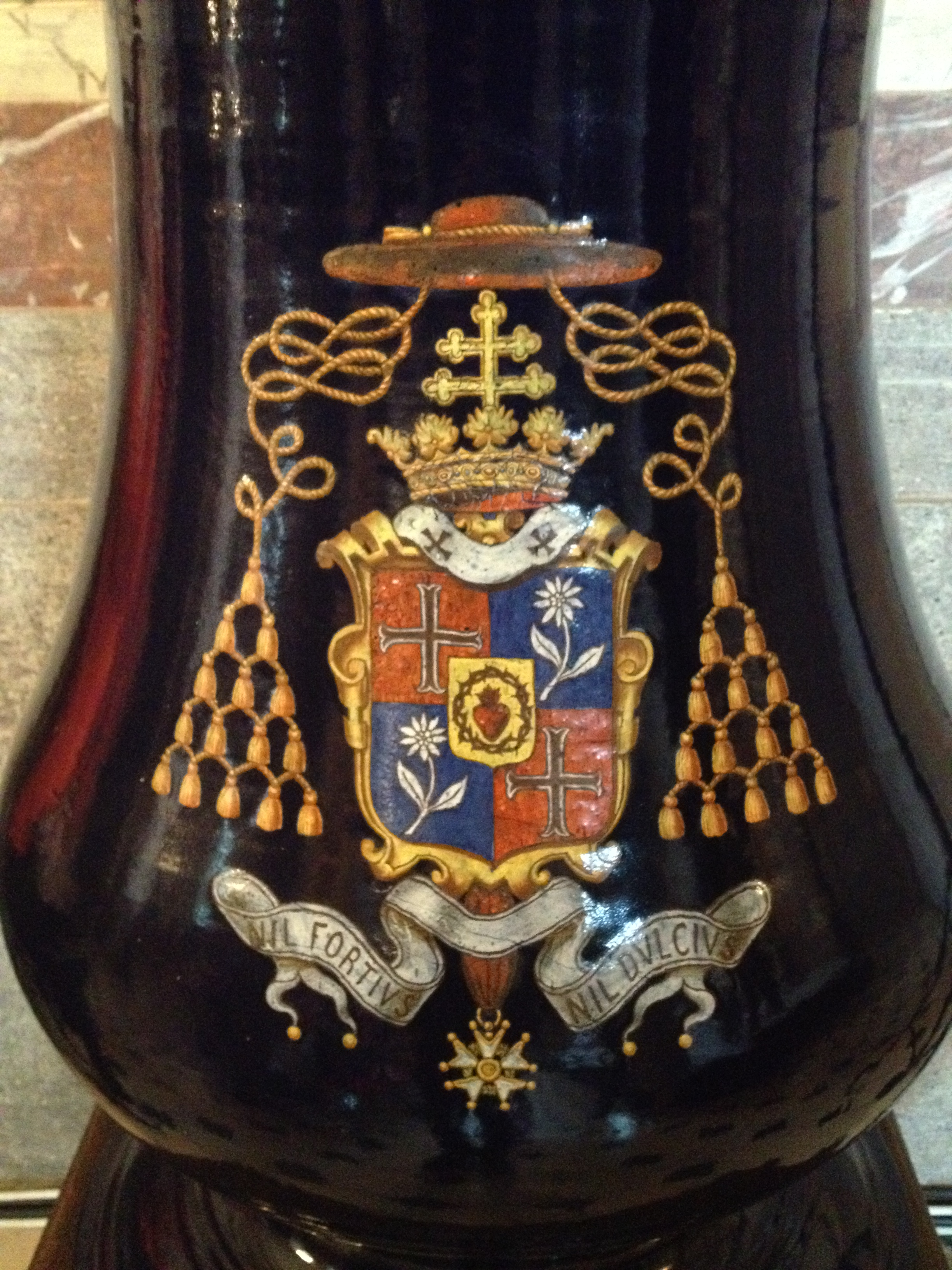 Armoiries sur un vase de Léon-Benoit-Charles Thomas, dans la salle des États de l'archevêché.